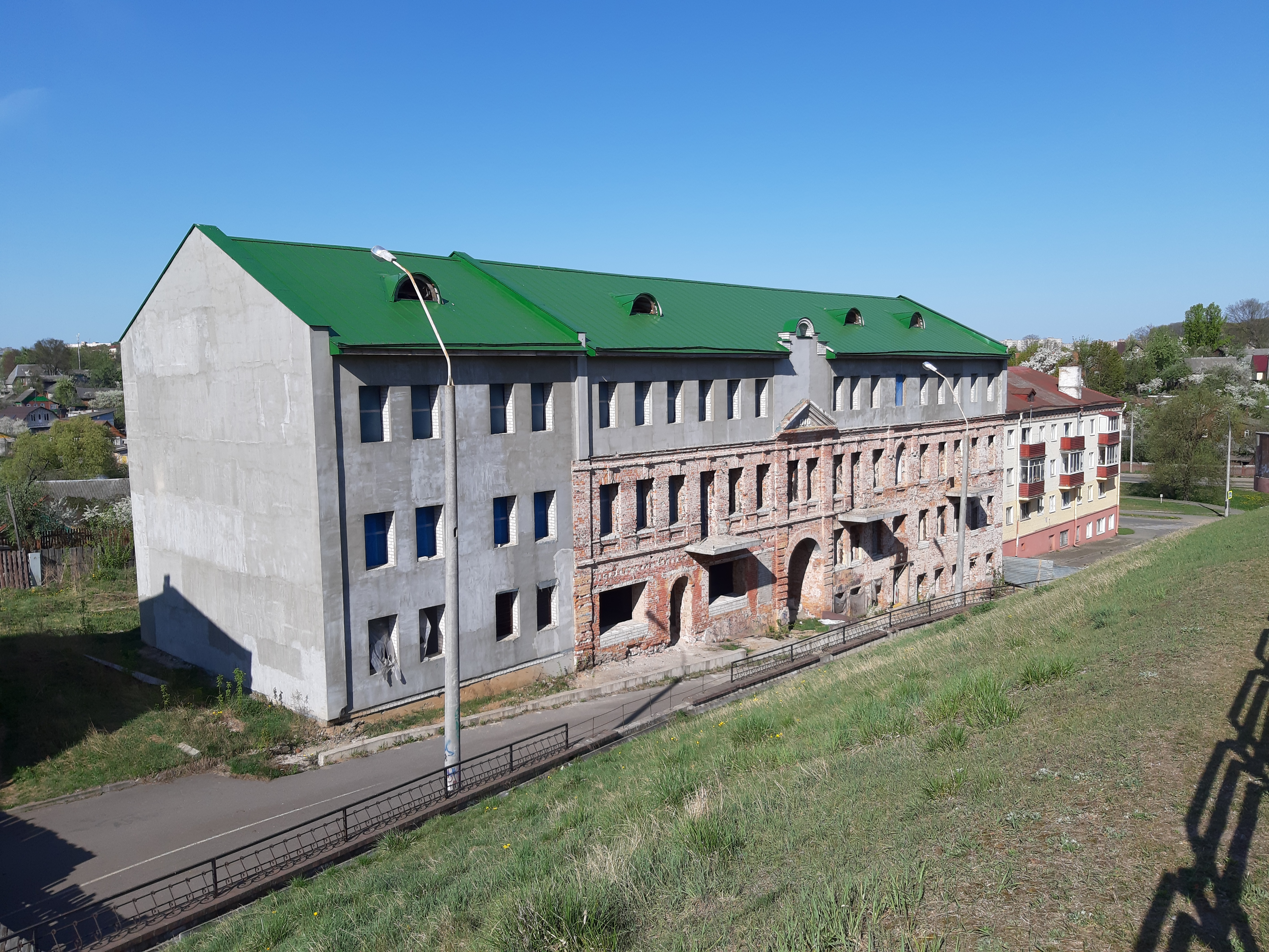 Магілёў. Па Лазарэнкі